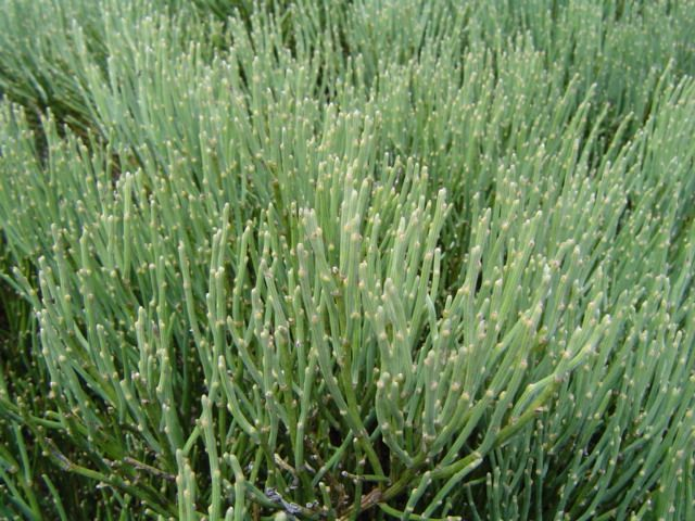 Piorno Cytisus oromediterraneus, La Serrota, Avila, España